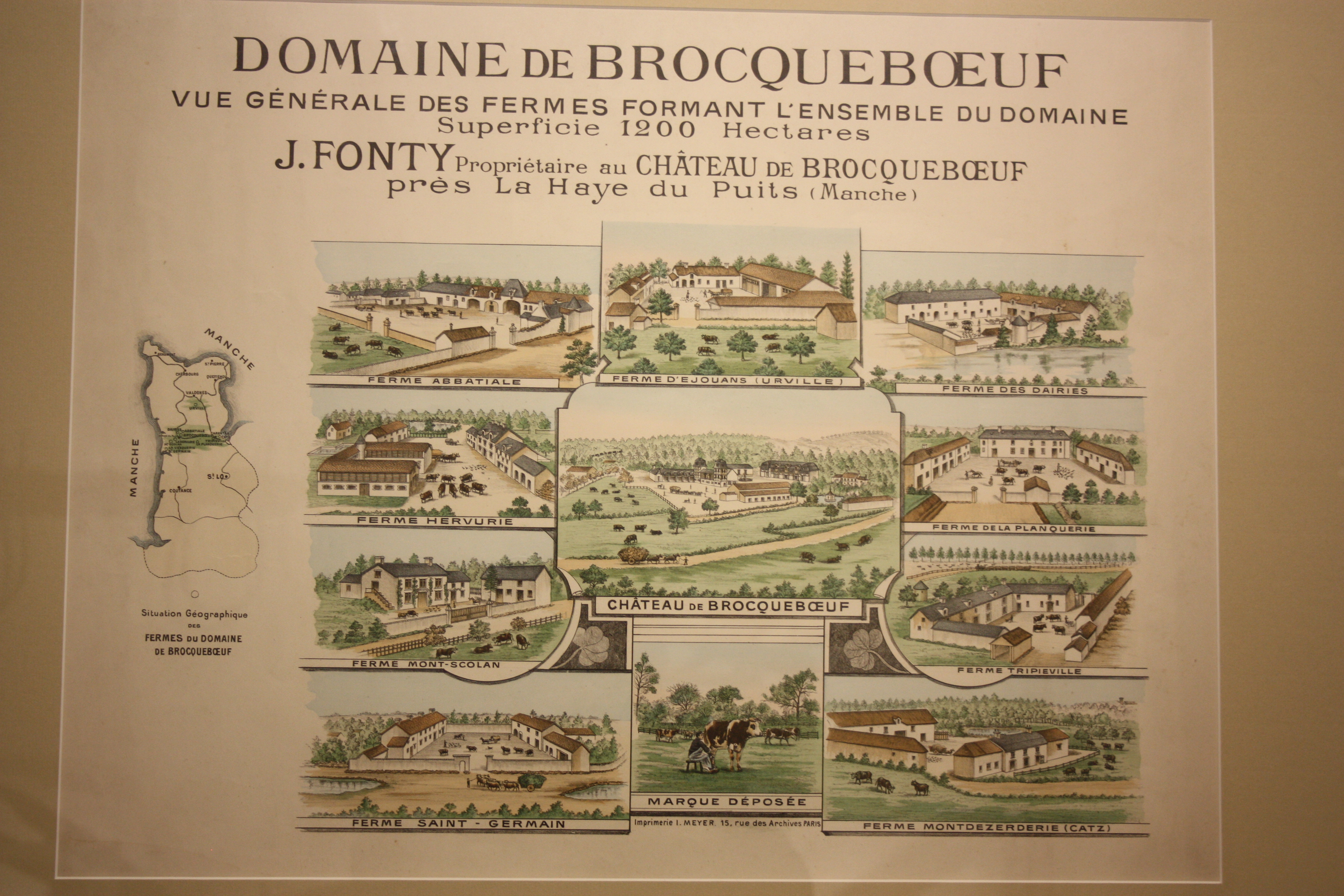 ferme de Brocqueboeuf